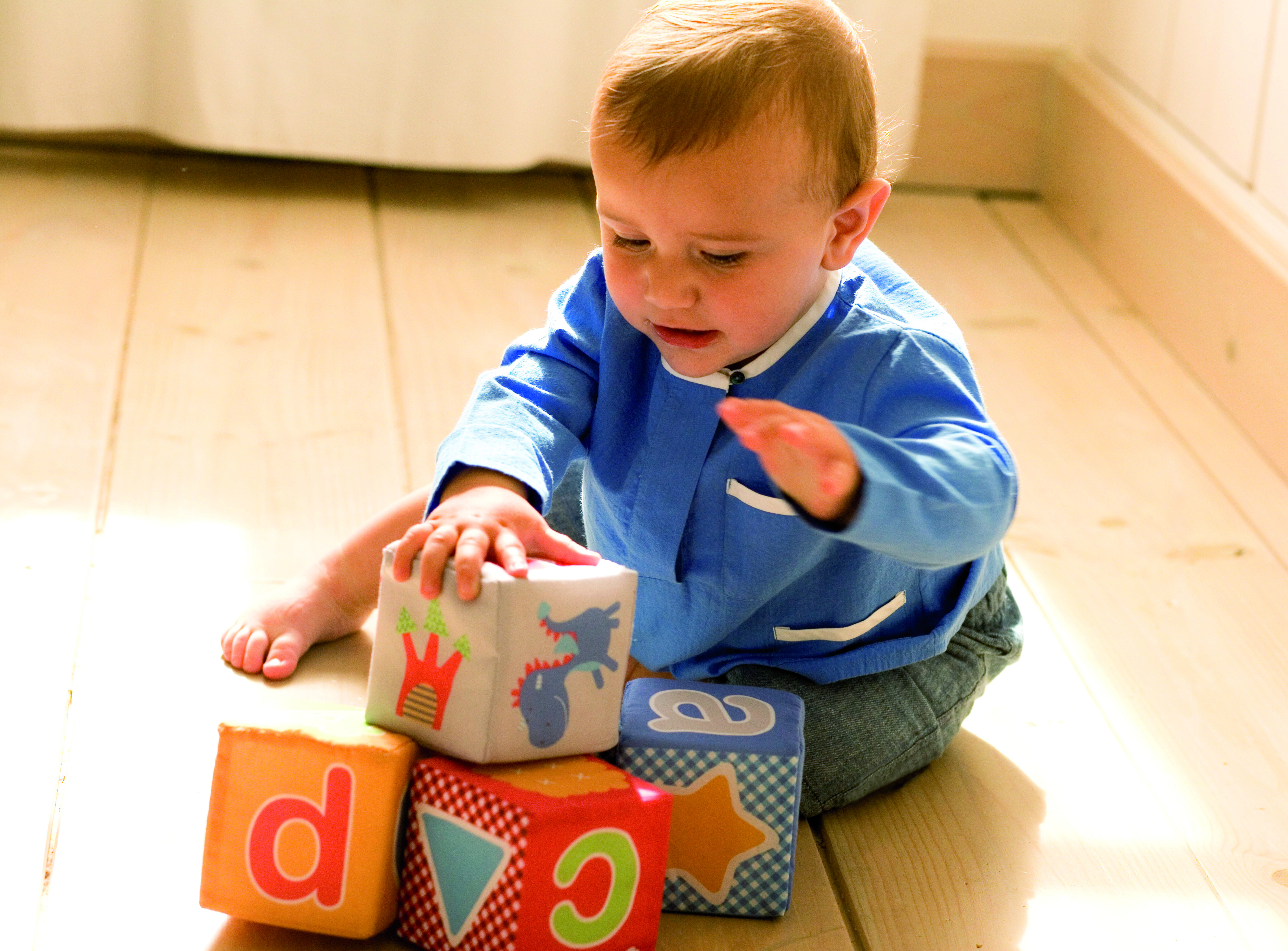 niño jugando